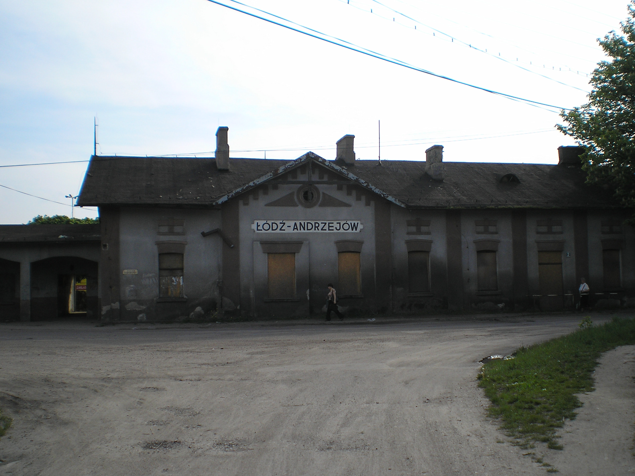 Stacja PKP Łódź-Andrzejów